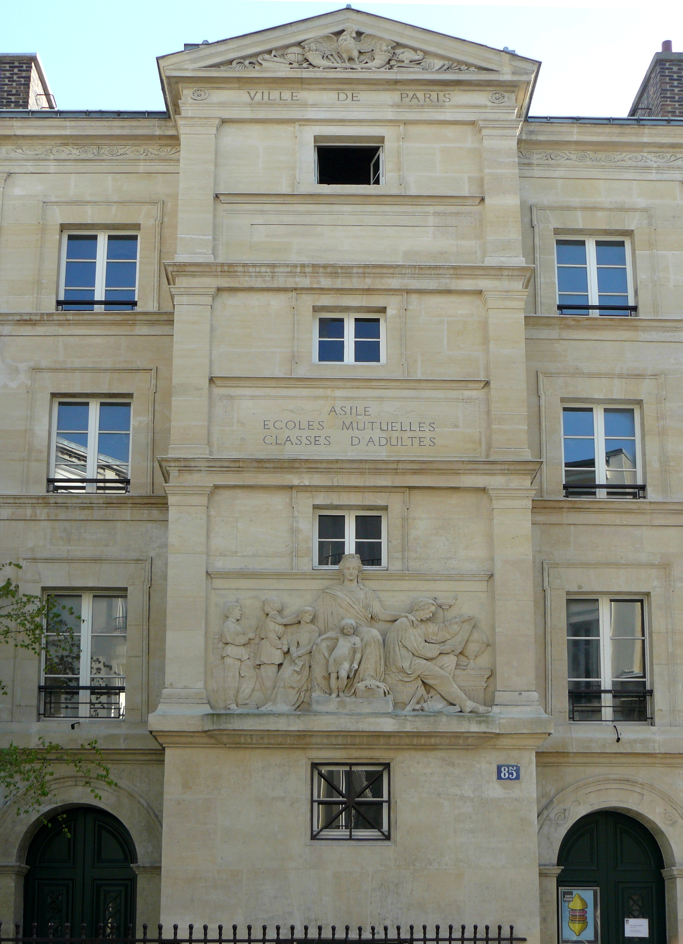 Ancien bâtiment de l'école mutuelle des parents, 85 rue de Vaugirard (Paris, 6e arrond). Bas relief d'Aimé Millet (1850) - façade inscrite au titre des Monuments historiques, ce bâtiment a abrité l'École technique de photographie et de cinéma, aujourd'hui École nationale supérieure Louis-Lumière transférée à Noisy-le-Grand